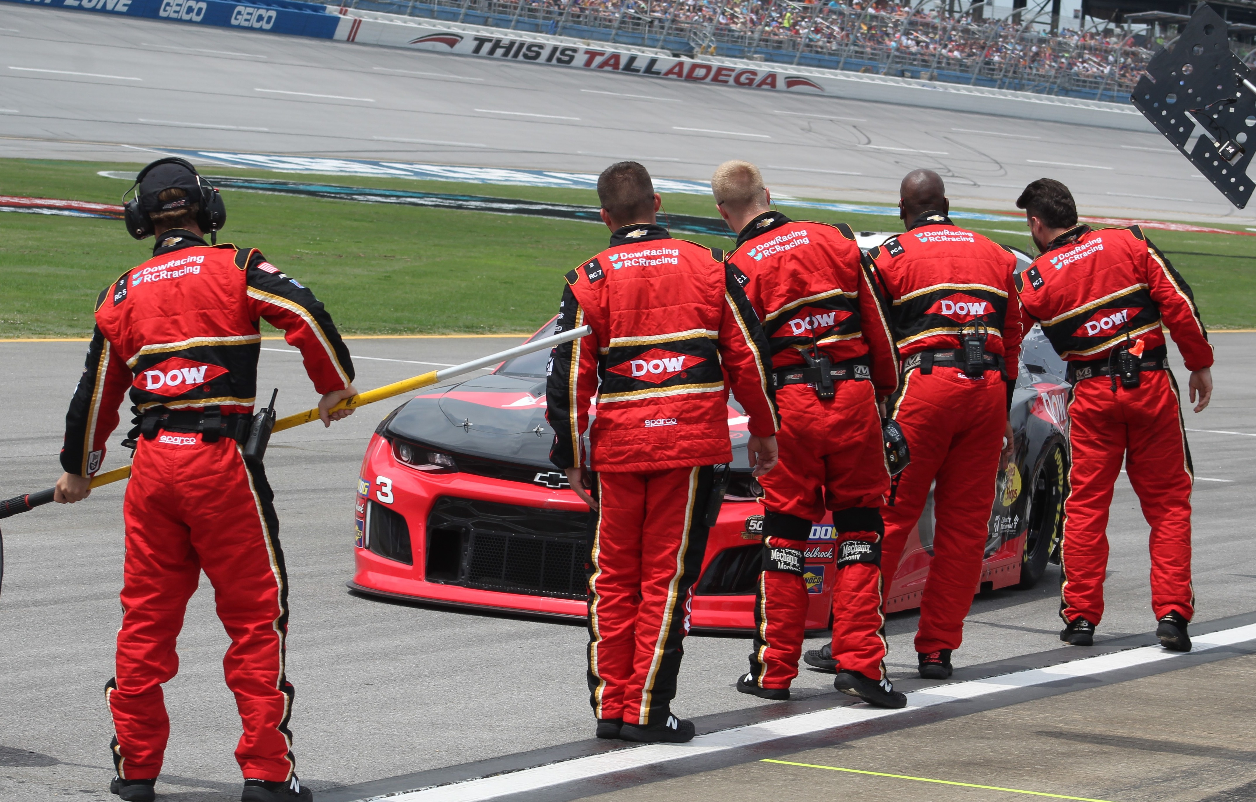 2019 GEICO 500